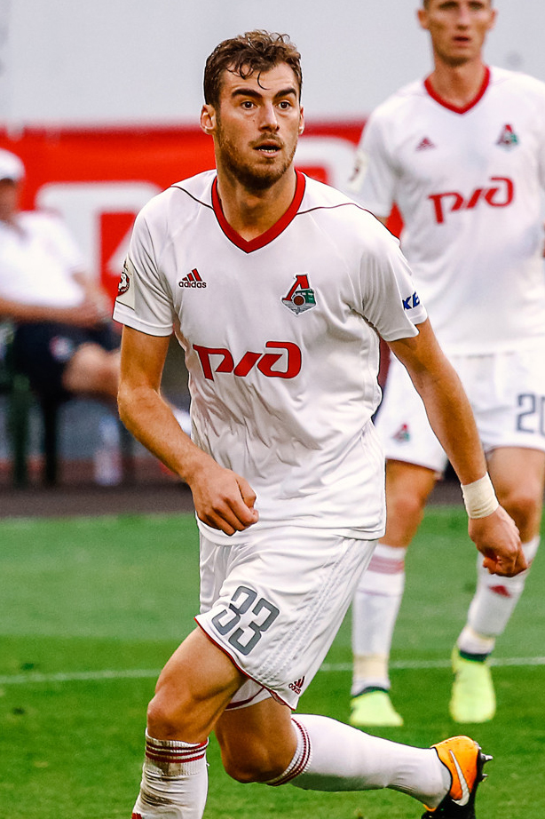 «Локомотив» - «Тосно»